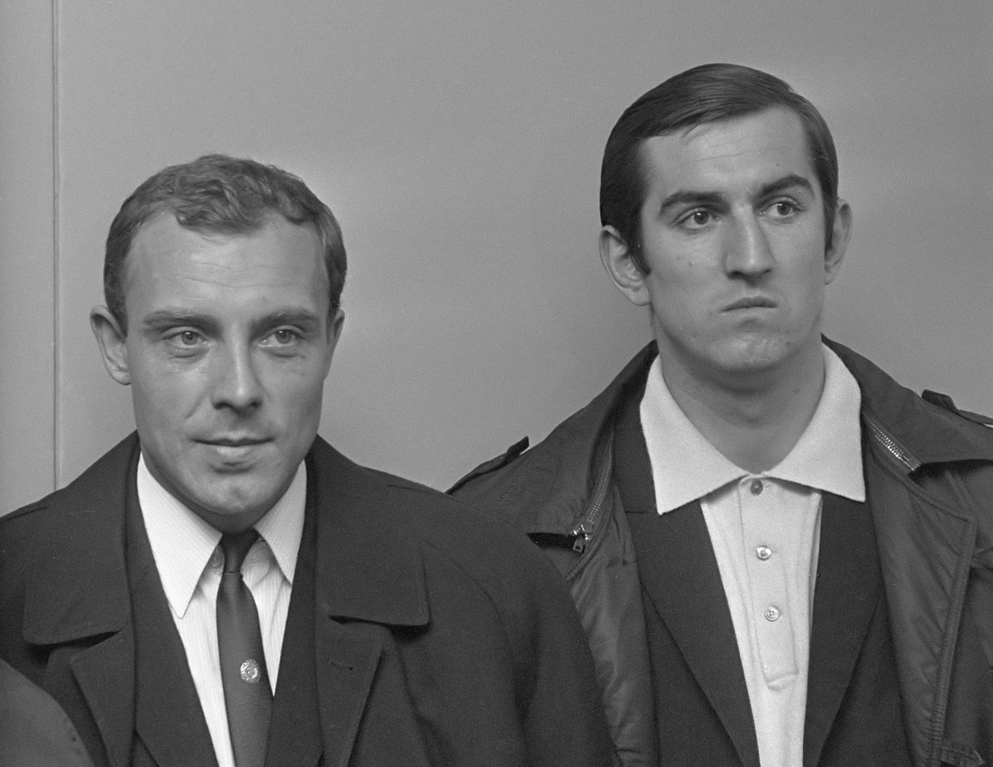 Spartak Trnava arriveert op Schiphol voor de wedstrijd tegen Ajax v.l.n.r. Kabat, Kuna en Dobias 11 april 1969